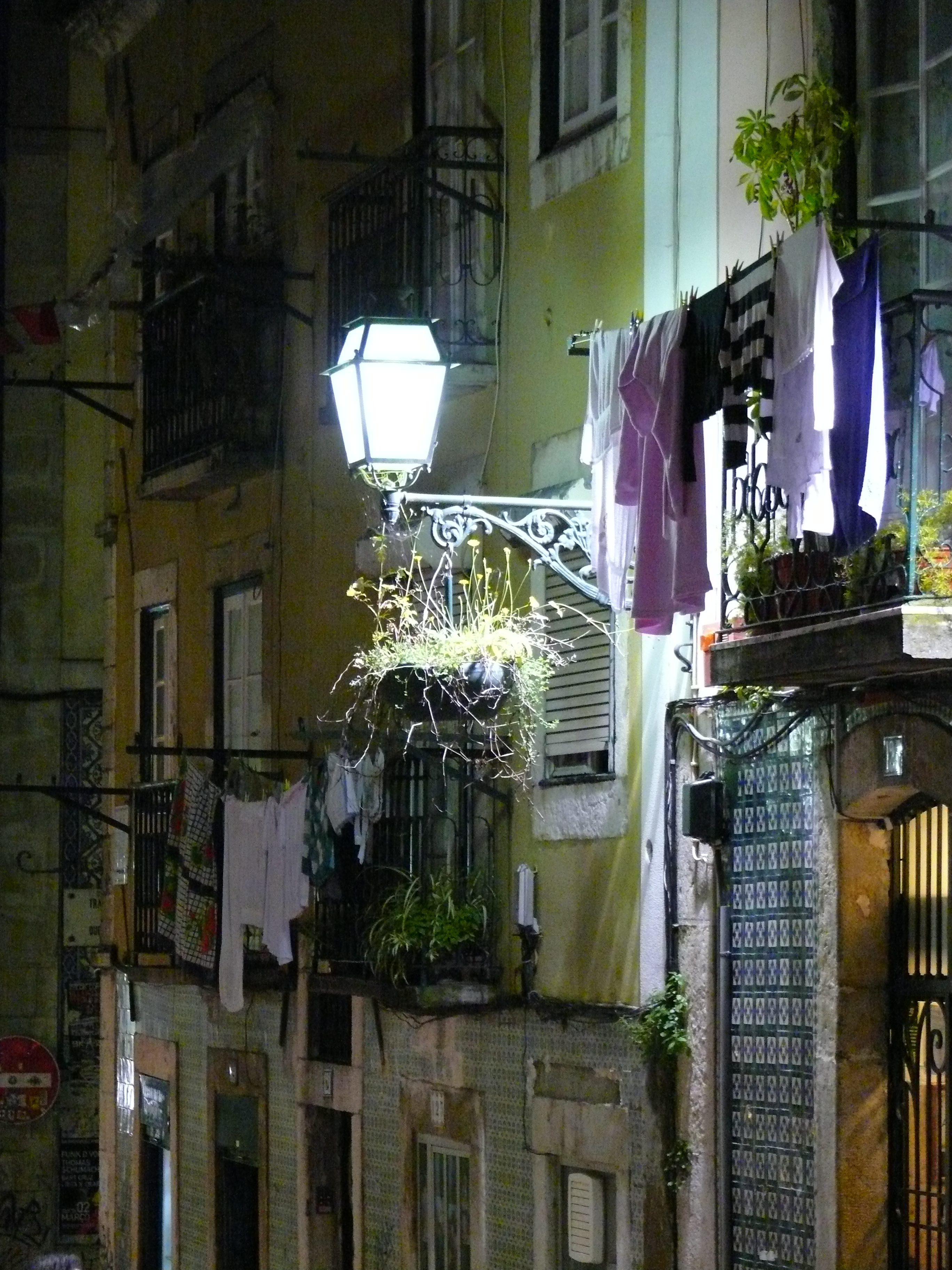 bairro Alto